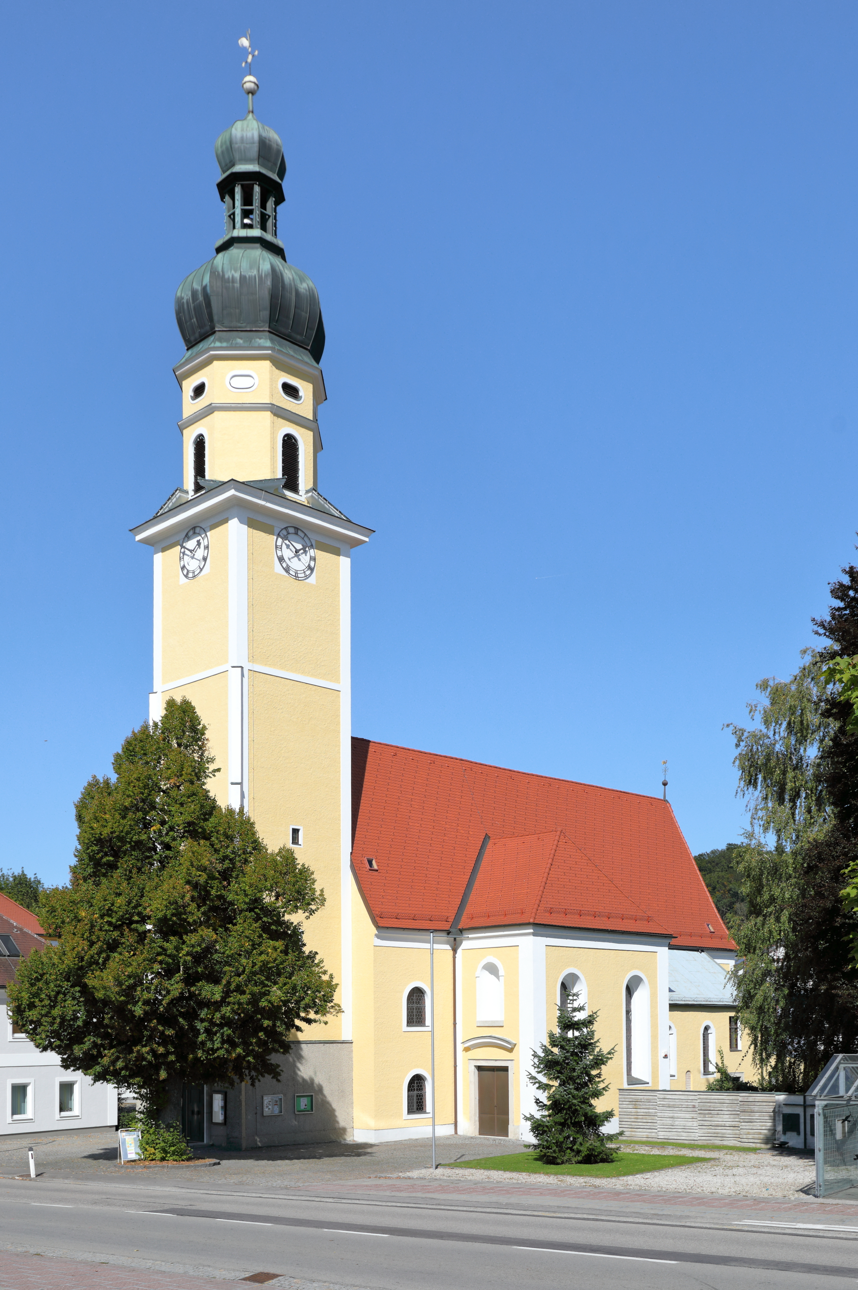 Südansicht der röm.-kath. Pfarrkirche hl. Martin in Diesseits, Hauptort der oberösterreichischen Marktgemeinde St. Martin im Innkreis.Der ursprünglich gotische Sakralbau wurde 1781 von Ignaz Prechtler im barocken Stil umgebaut. Der vorgestellte Westturm wurde laut Inschrift 1594 errichtet und 1714 mit einem achtseitigen Aufsatz sowie einem Zwiebelhelm mit Laterne erhöht.